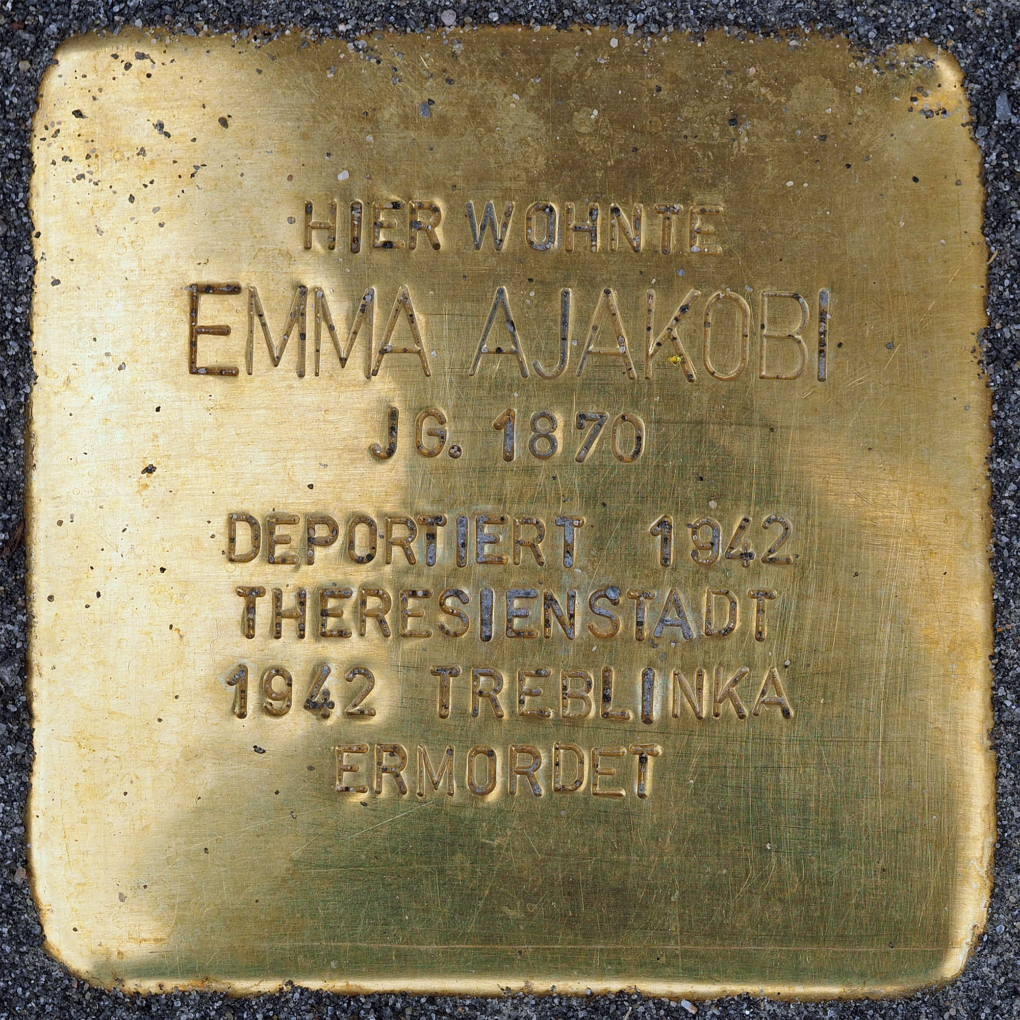 Stolpersteine Kempen: Ajakobi, Emma